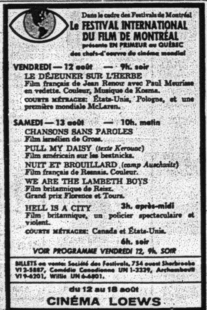 Cette publicité tirée du journal quotidien La Presse, éditions du 12 août annoncent les films présentés dans le cadre du Festival International du film de Montréal